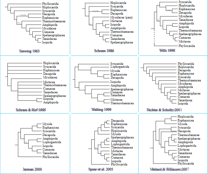 Esse conjunto de filogenias dos Malacostracas descreve como a classificação do grupo variou ao longo do tempo.